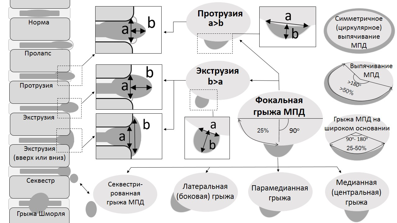 Типы грыжевых выпячиваний МПД